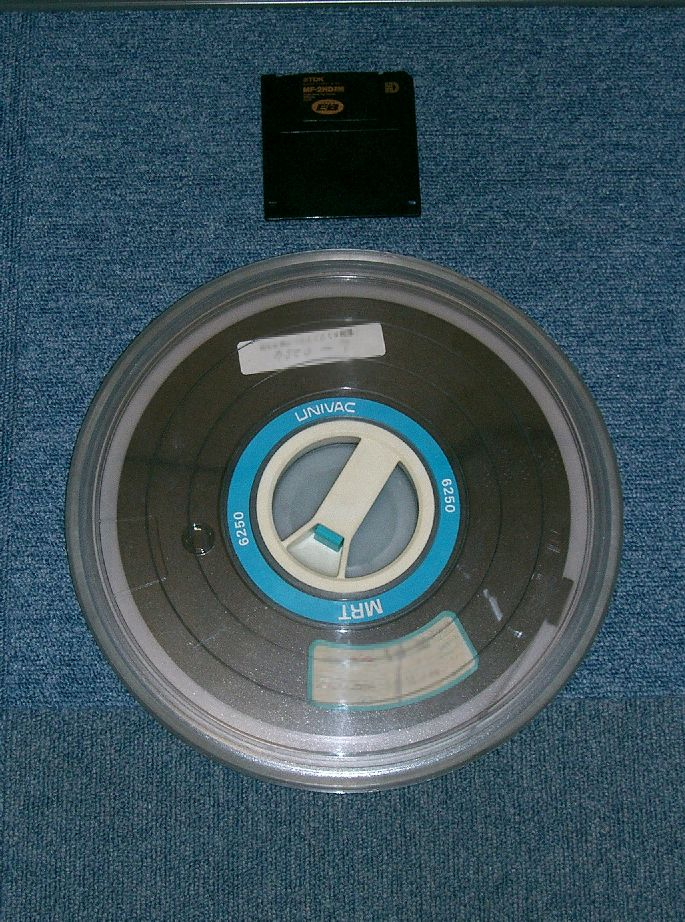 Data storage tape media